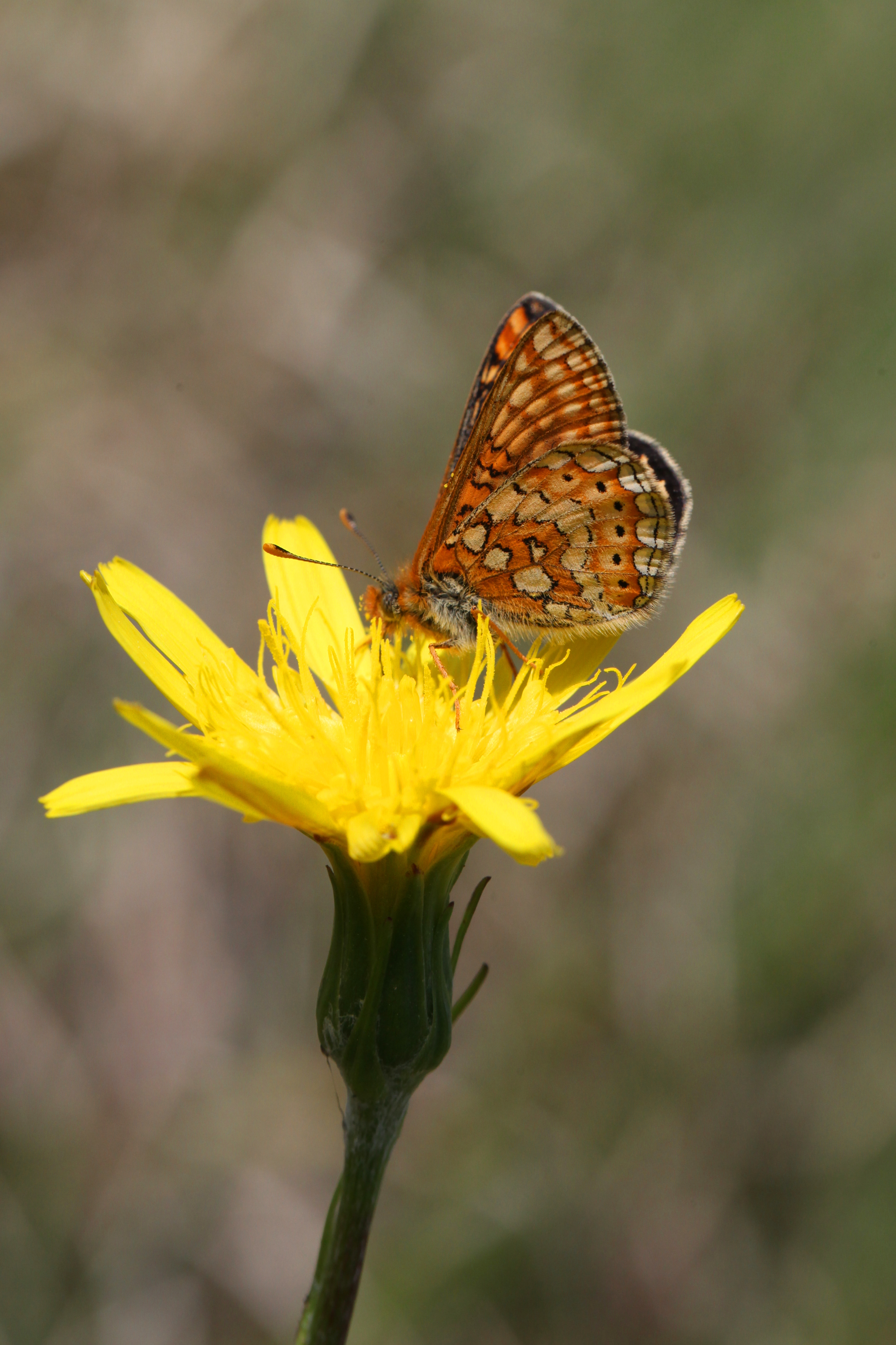 Première rencontre à Fontelenay avec le Damier de la succise (Euphydryas aurinia), papillon protégé.